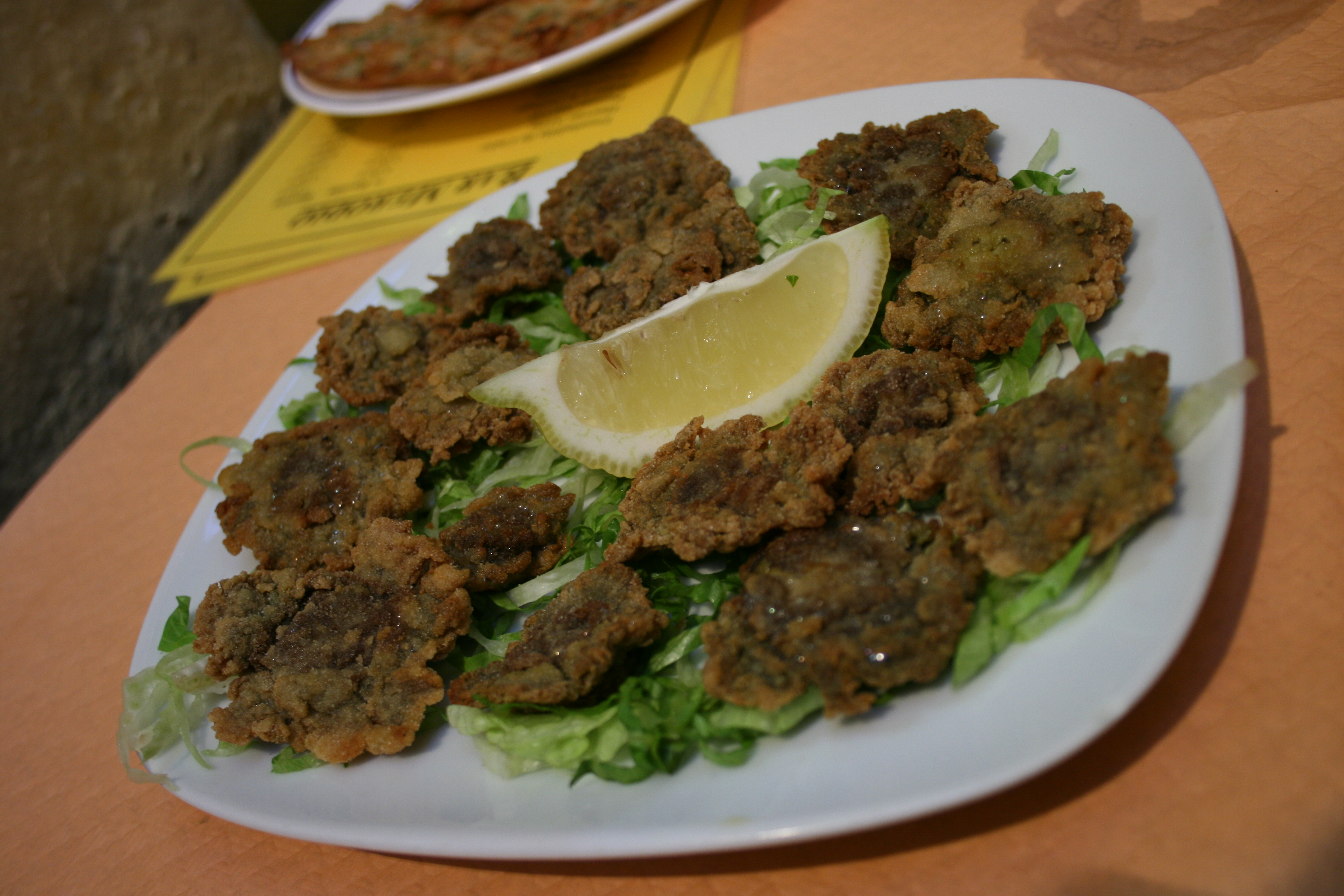 Ortiguillas- Cádiz